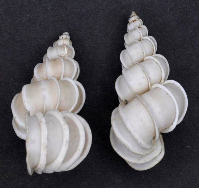 Epitonium scalare (Linnaeus, 1758)